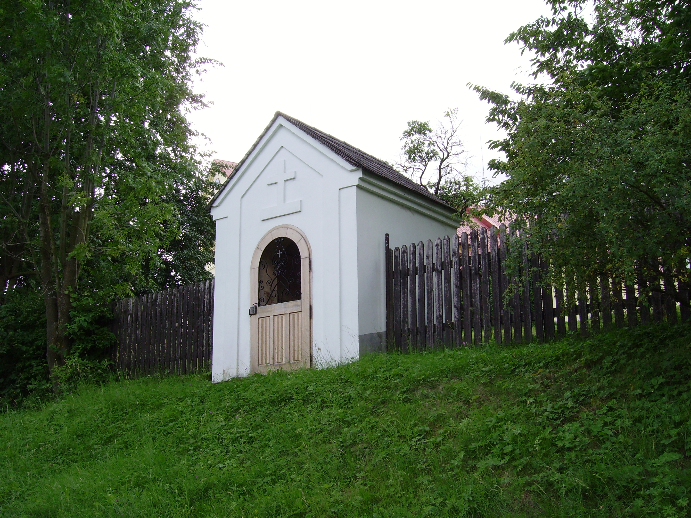 Obec Razová